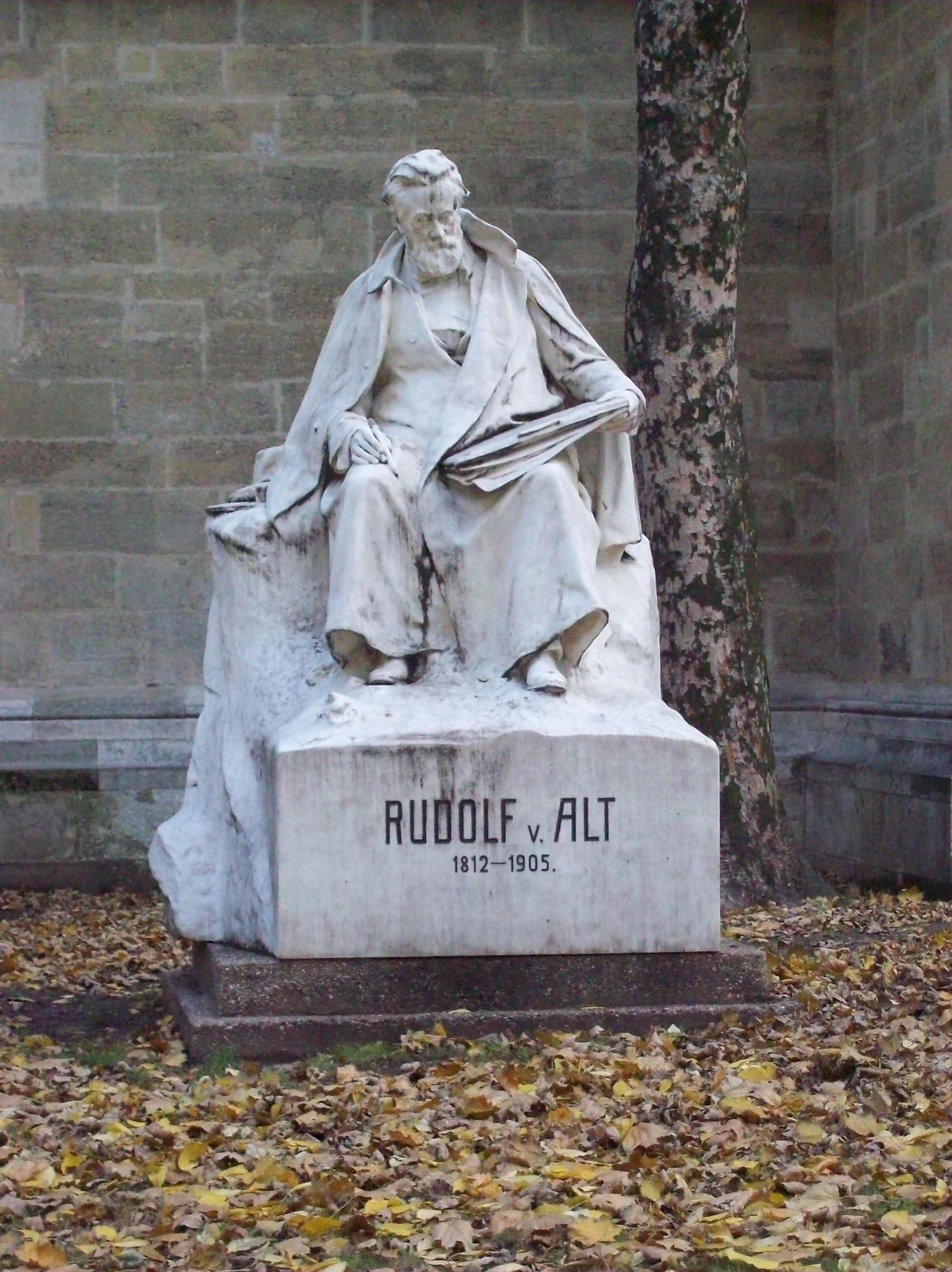 Rudolf von Alt (1812–1905) festő szobra Bécsben